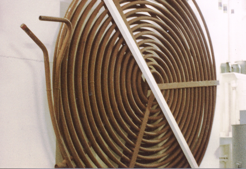 Abgaskessel, La Mont Heizrohr